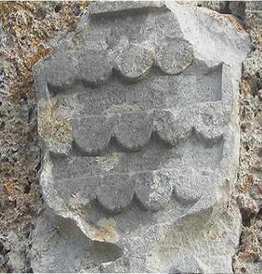 Οικόσημο των Τόκκων σκαλισμένο σε πέτρα εντοιχισμένη σε μια Βαρδιόλα ( Παρατηριτήριο, σκοπιά)στην περιοχή Κυψέλης Ζακύνθου.